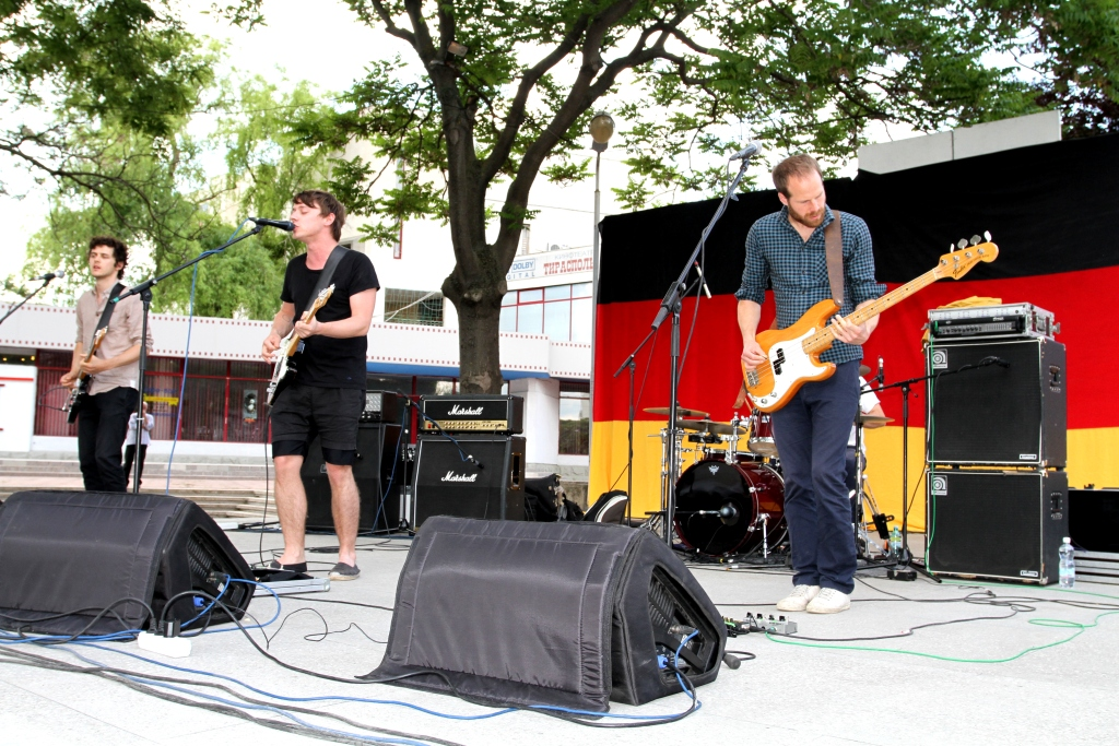 Немецкая рок-группа «Fotos» в Тирасполе